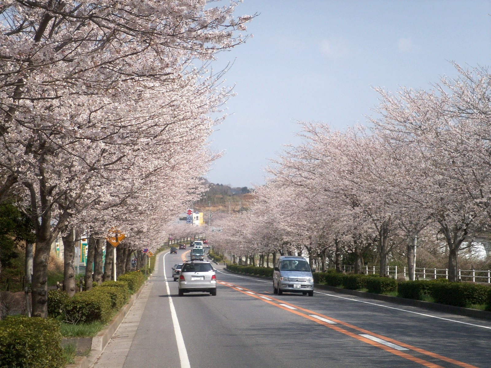 常総ふれあい道路の桜並木（取手市米ノ井）